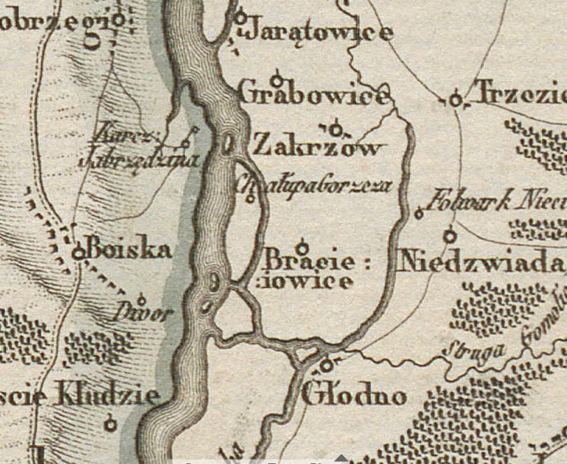 Chałupa Goszcza